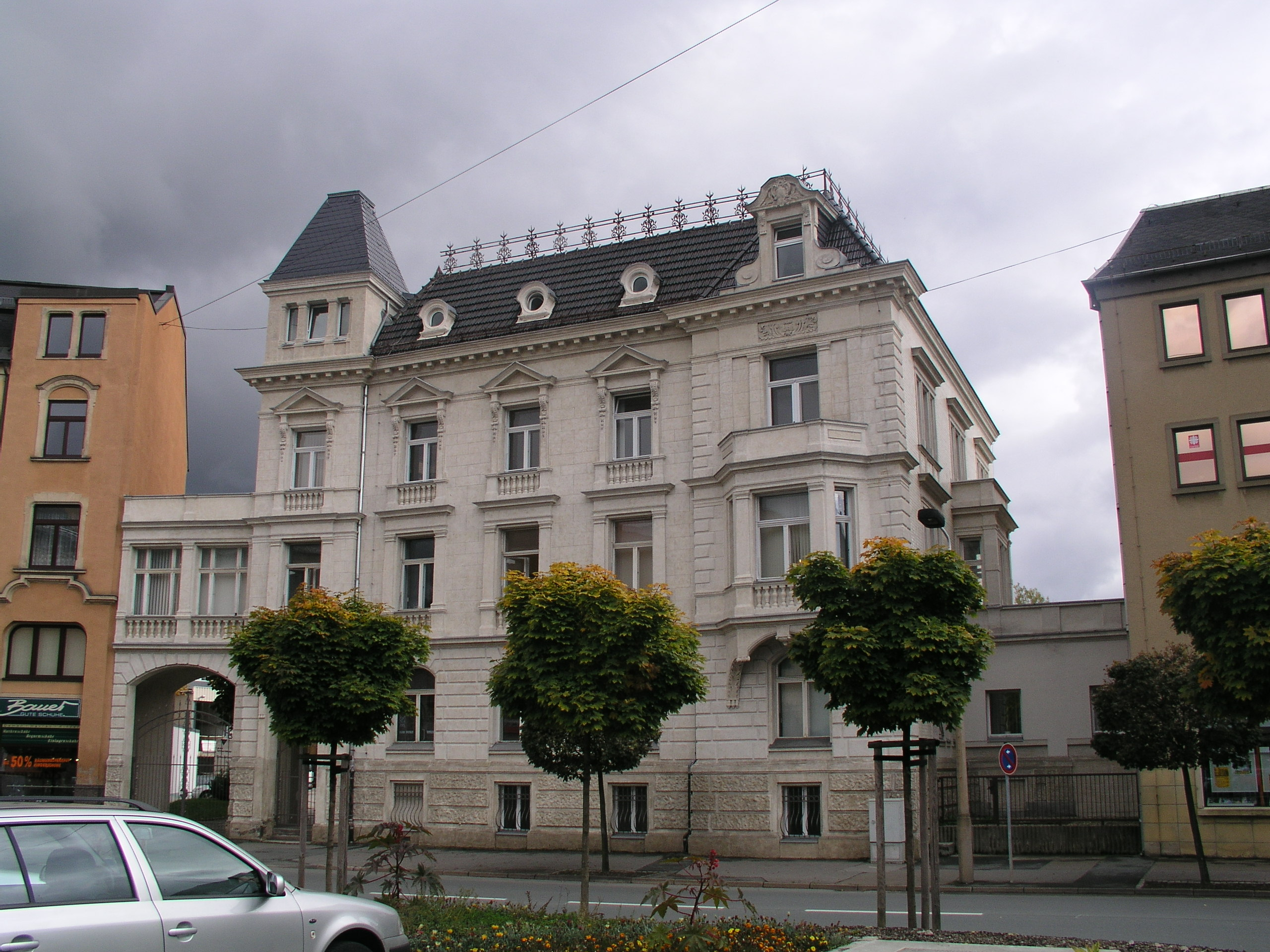 eh. Verwaltungsgebäude der Wäschefabrik „Curt Bauer“ in der Bahnhofstraße